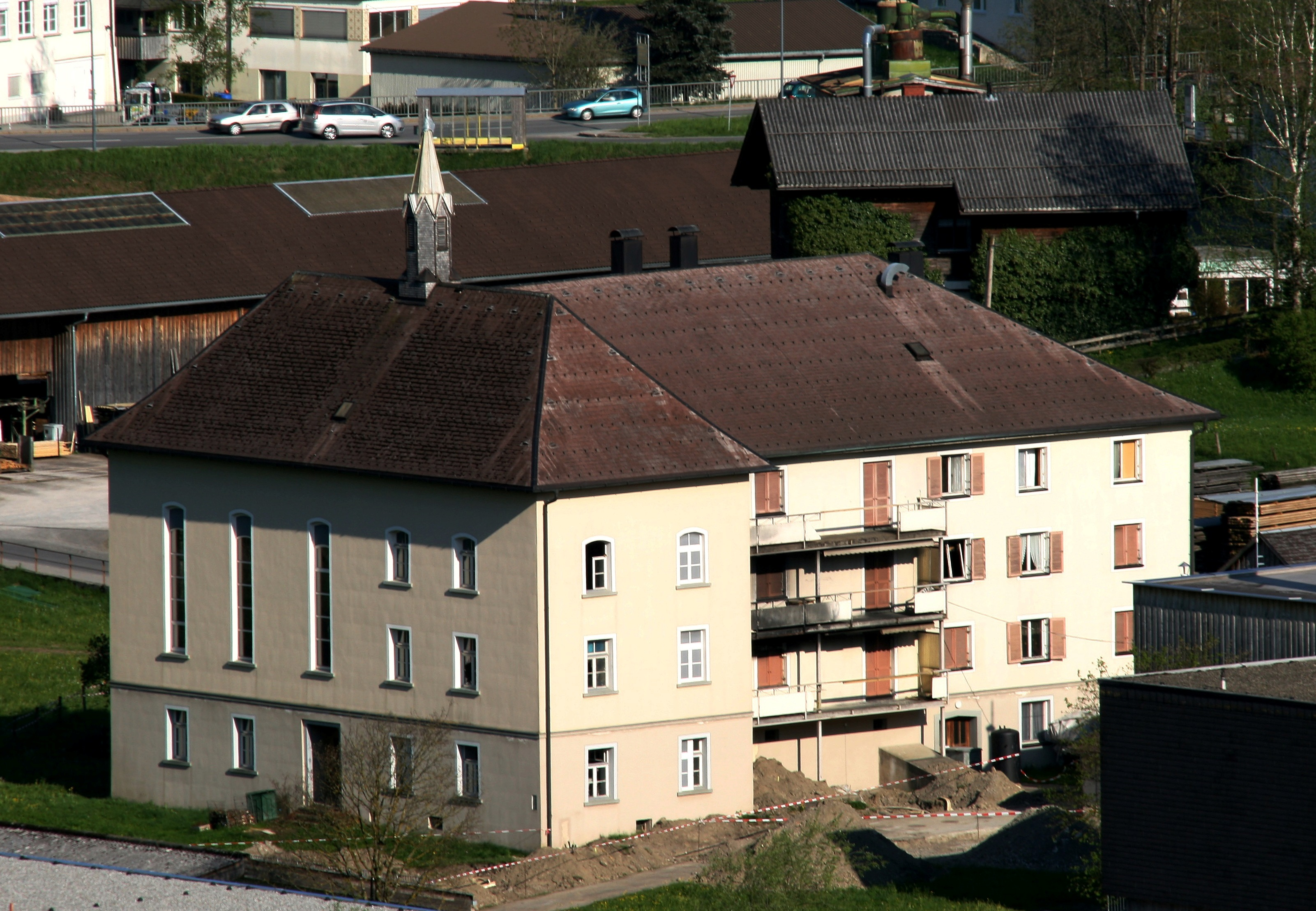 Blick von Kammern in Egg, Vorarlberg auf das Vinzenzheim (siehe Artikel Brand im Vinzenzheim in Egg 2008.